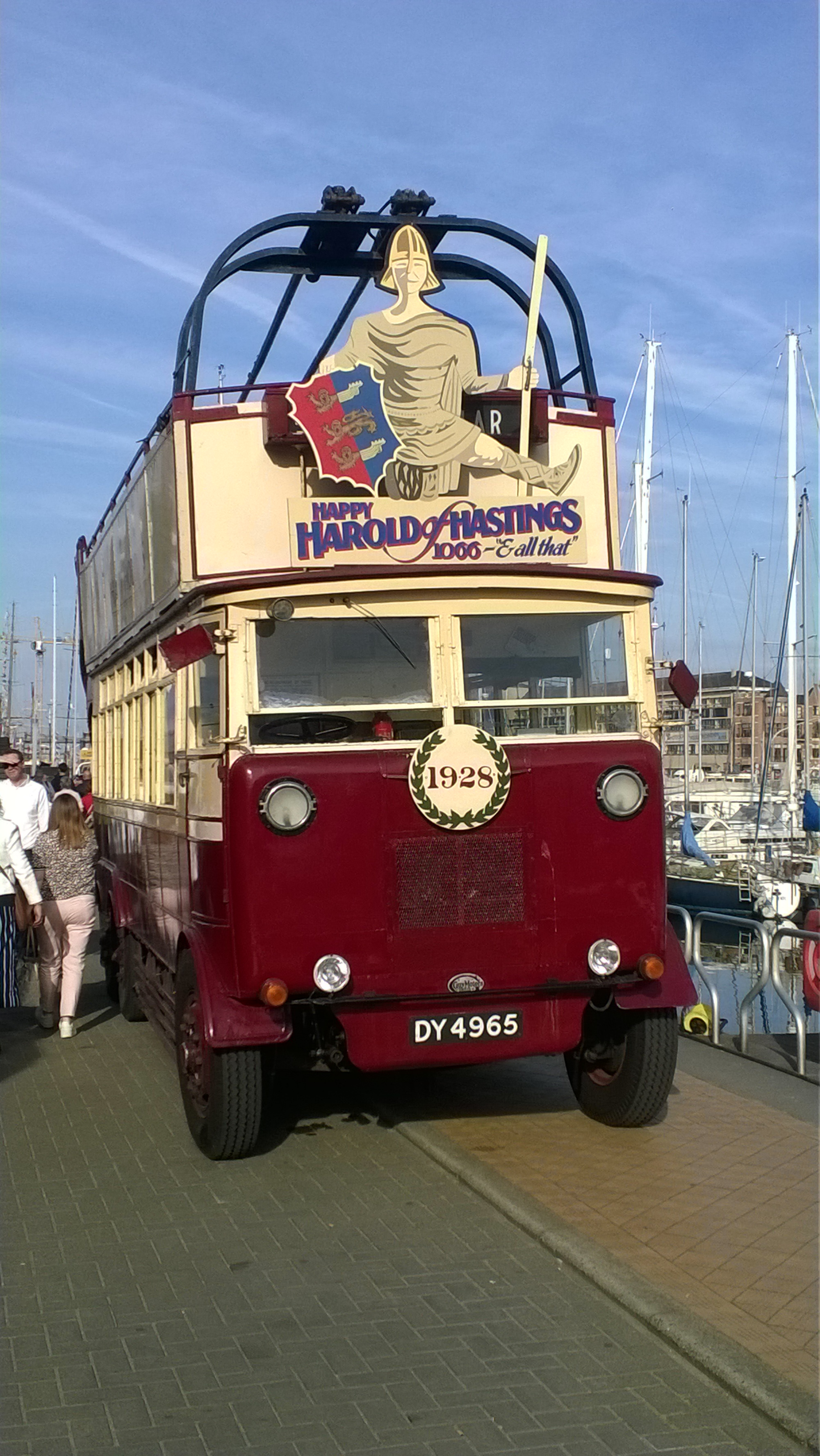 Historische trolleybus van Hastings (DY 4965) met open dak tijdens Oostende voor Anker 2018